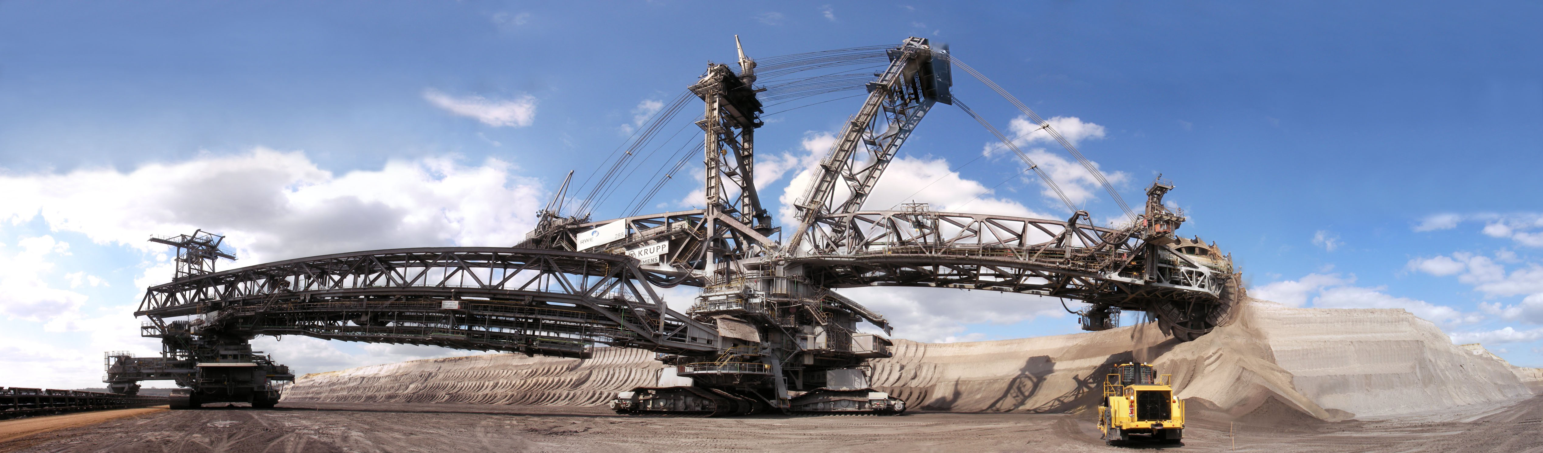 Schaufelradbagger 288 im Braunkohletagebau Garzweiler